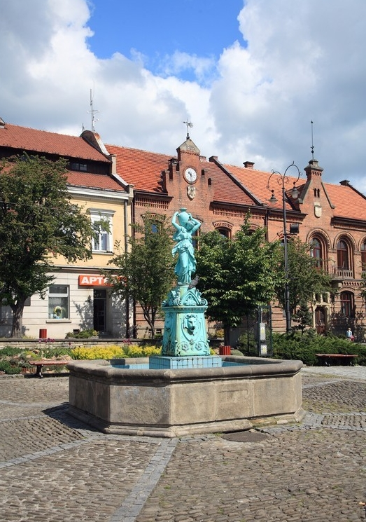 Myślenice (województwo małopolskie)